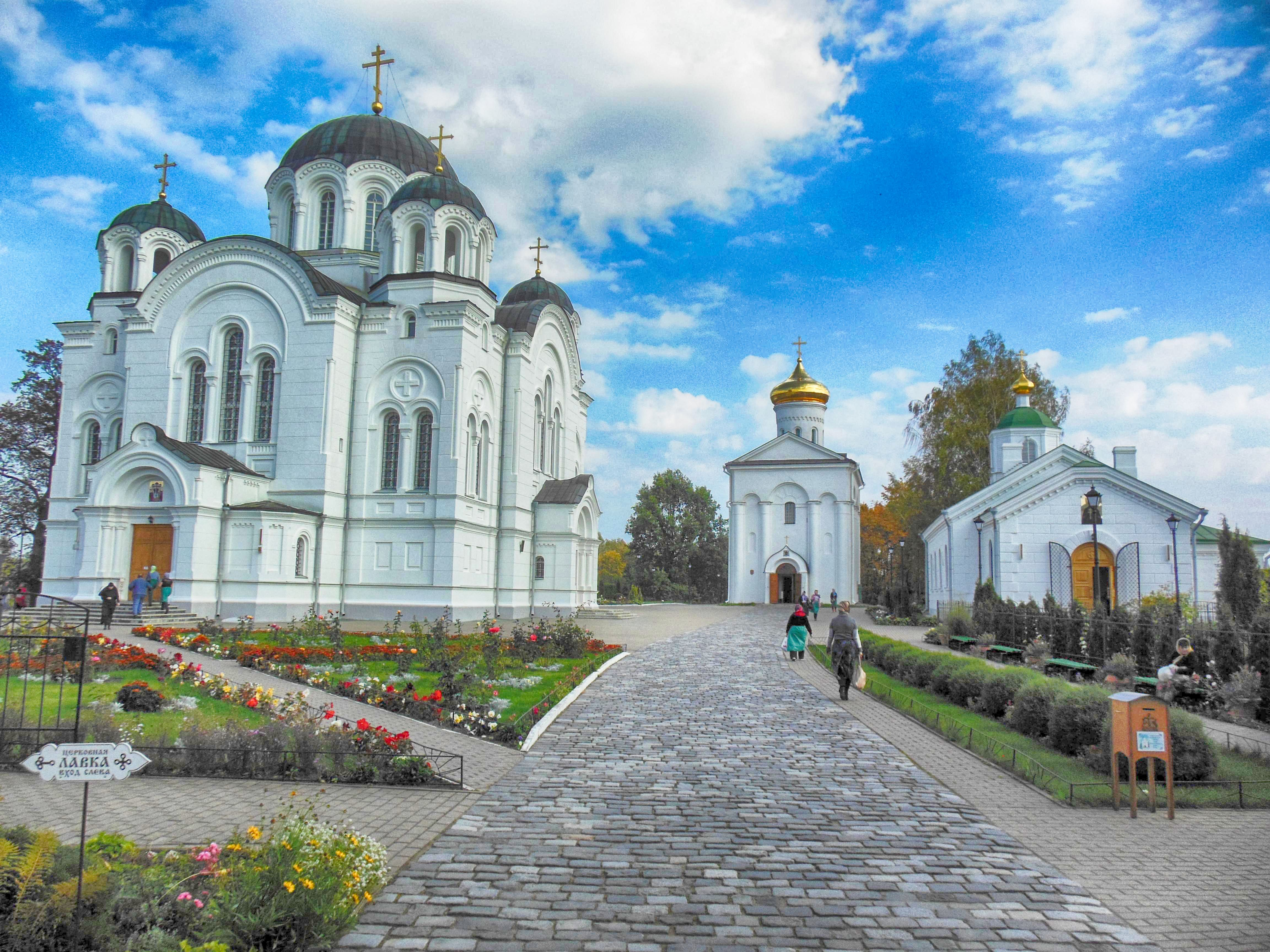 Беларуская (тарашкевіца): Спаса-Эўфрасіньнеўскі манастыр. г. Полацак This is a photo of Belarusian heritage monument. Reference number: 213В000625 ( WLM)